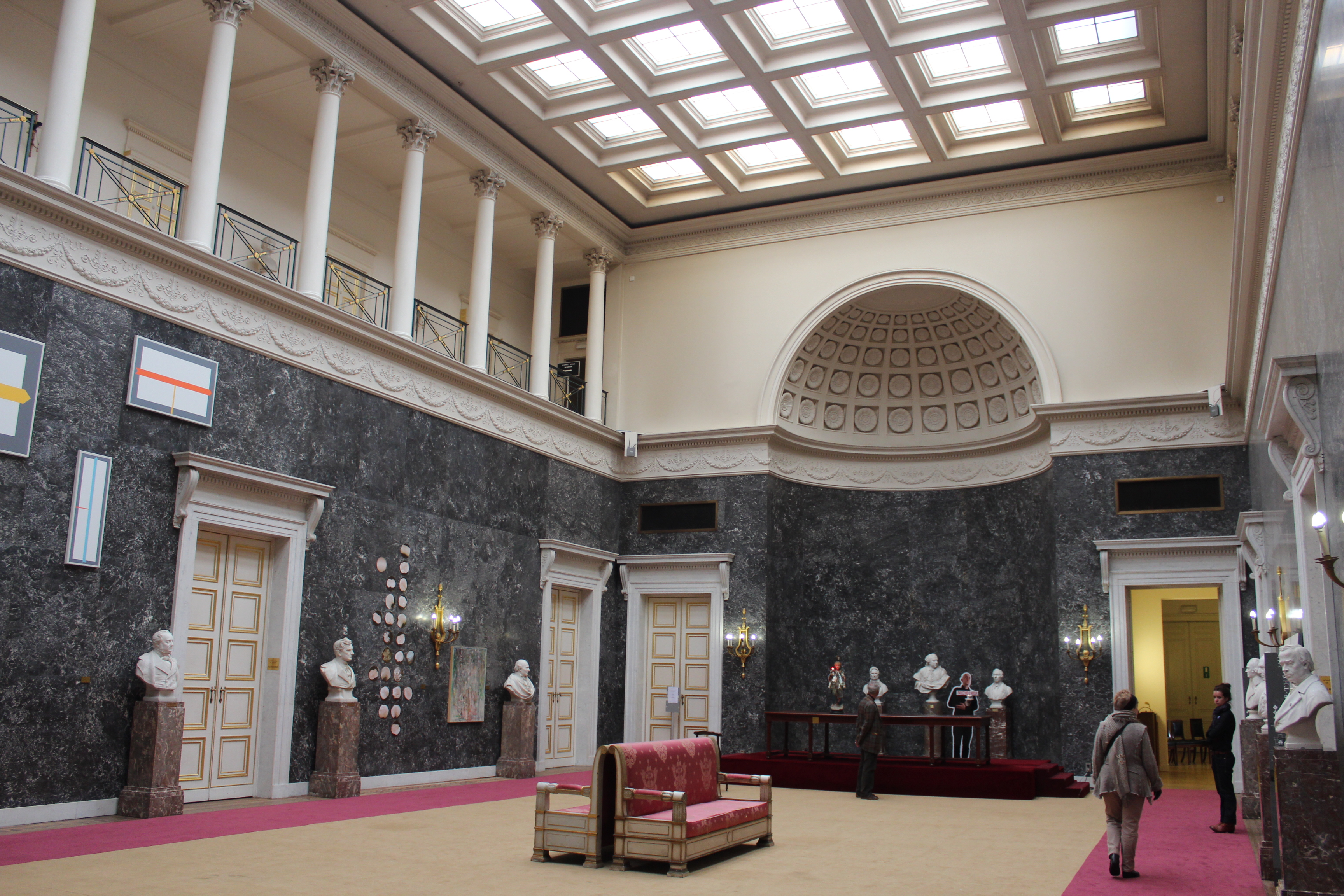 Het Academiënpaleis (of Paleis der Academiën, Frans: Palais des Académies) in Brussel, en neoclassicistisch gebouw opgetrokken tussen 1823 en 1828 door de staatsarchitecten Charles Vander Straeten en Tieleman Franciscus Suys. Troonzaal.